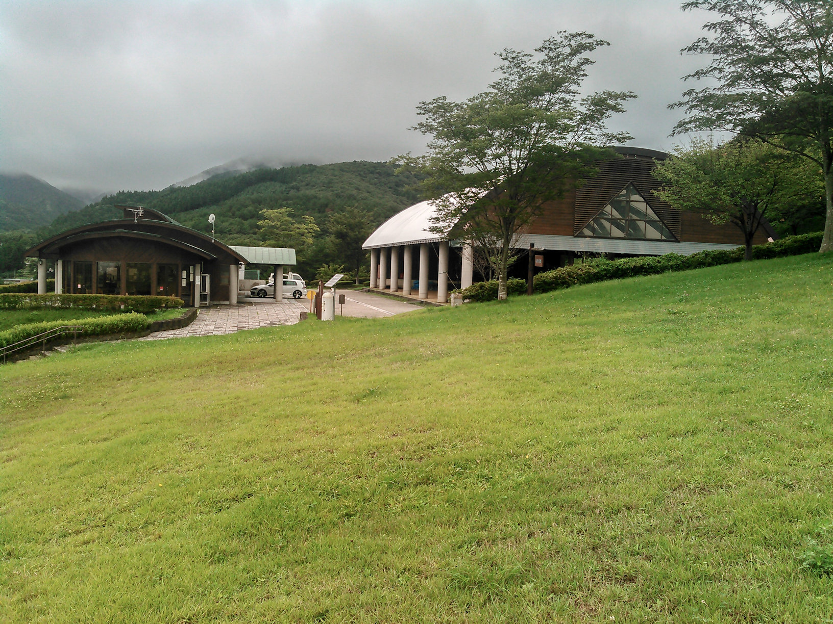 高篠山森林公園 管理事務所と森の体育館